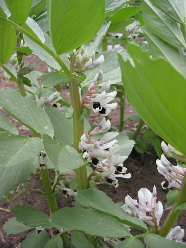 Vicia faba (Tuinboon)